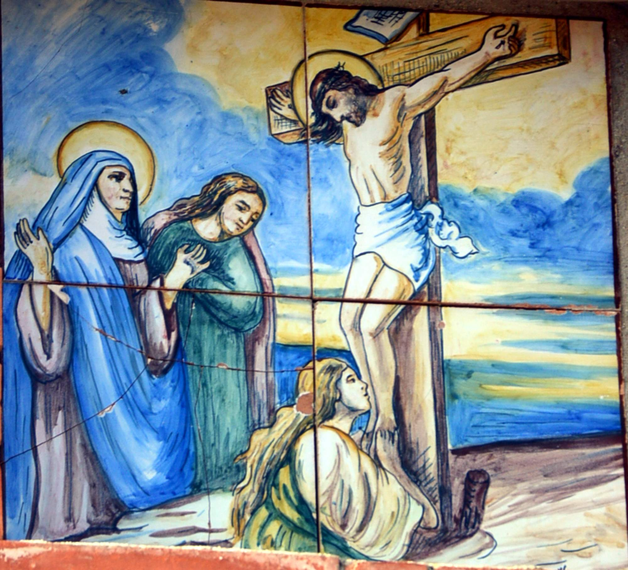 Estación XII del Viacrucis de Casasbajas (Valencia): Jesús muere en la cruz.